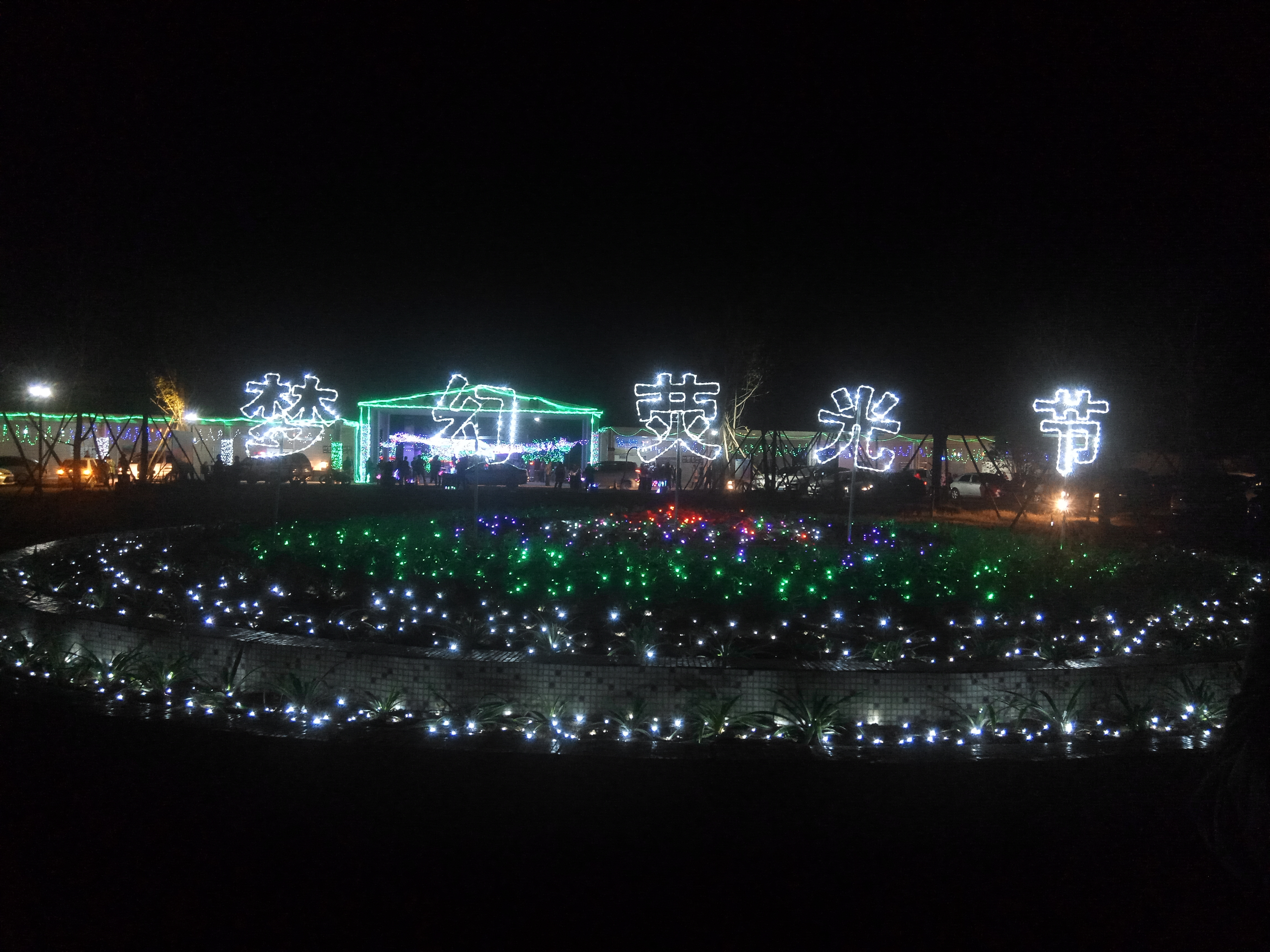 南雄市两岸花博园灯光节